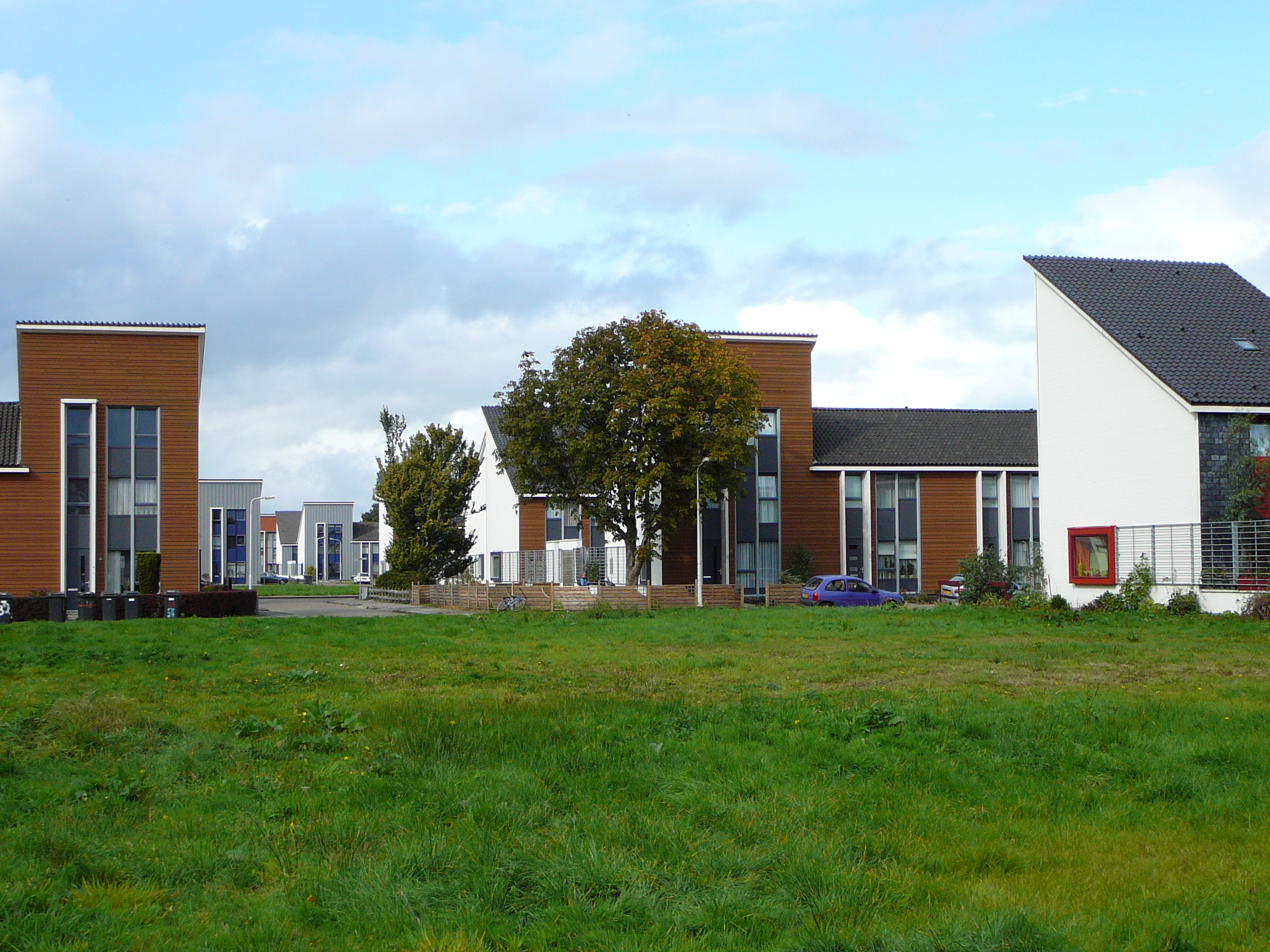 Herstructurering Martinibuurt Wolevga